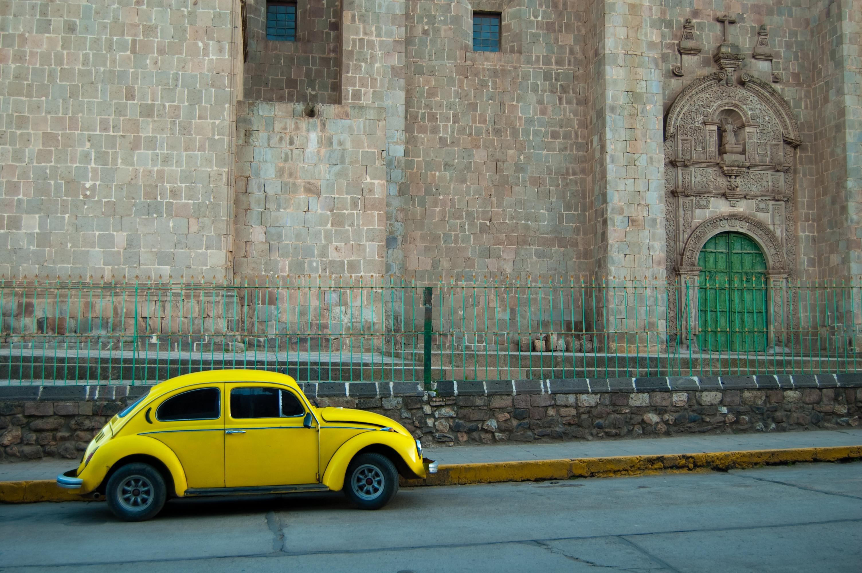 calles de puno